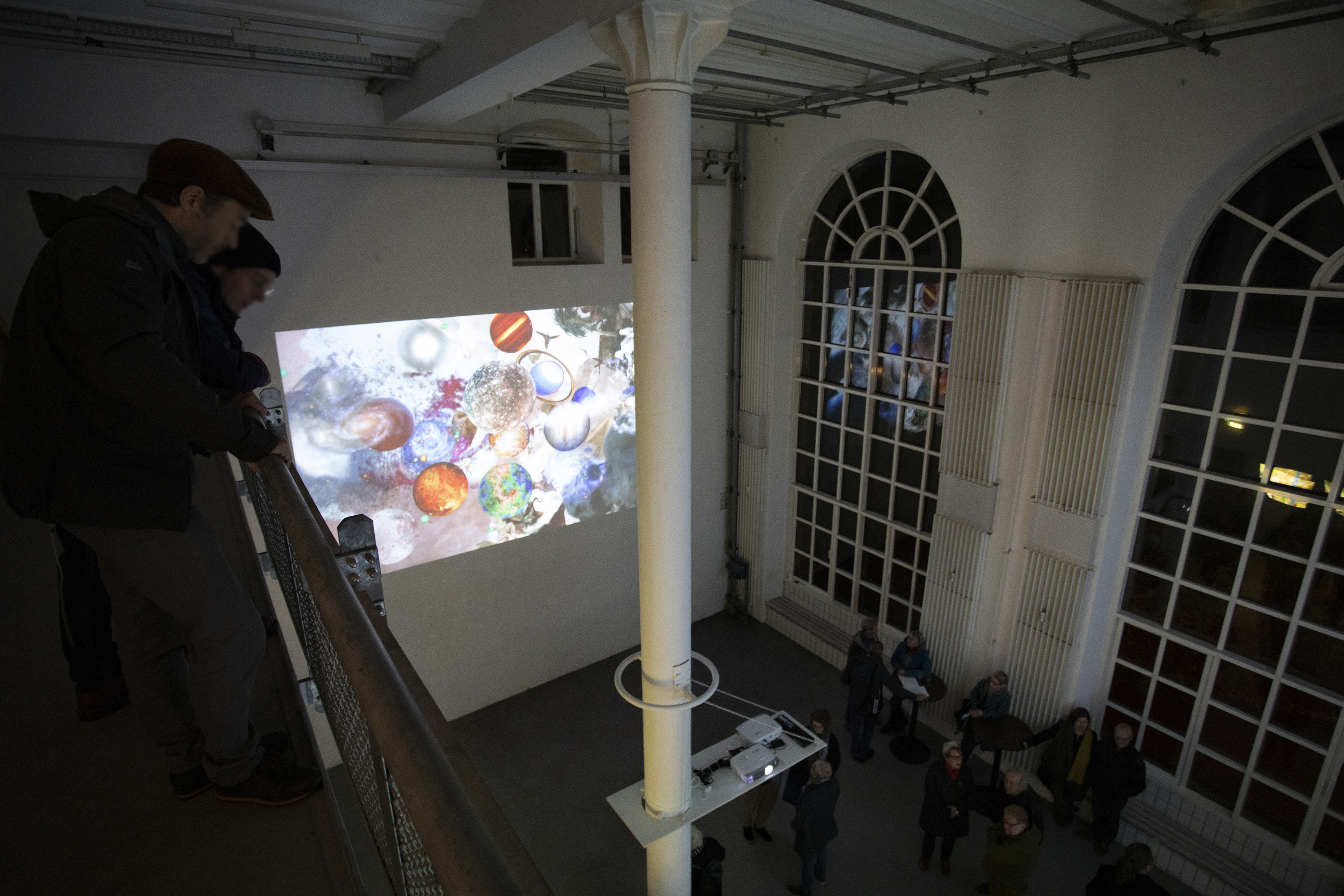 Galerie Peripherie im Sudhaus, Tübingen, mit Arbeiten von Myriam Thyes